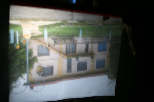 Image sur calque obtenue dans la camera obscura du Lherm Photo de Jean-Daniel Dodin, avec l'autorisation du musée